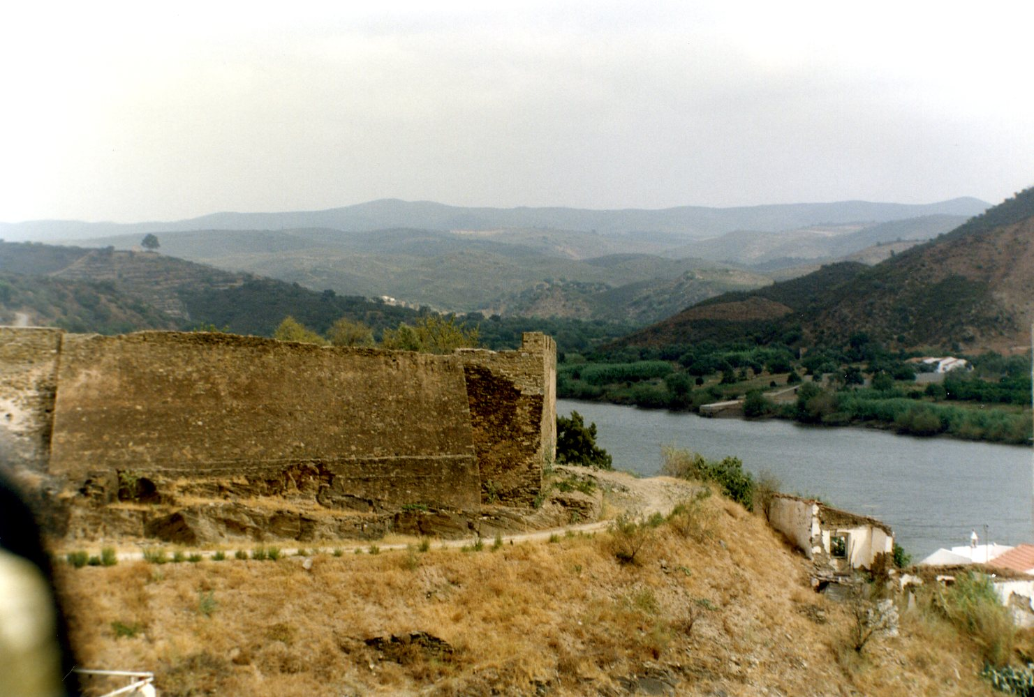 Fortaleza de Alcoutim ou Castelo de Alcoutim This file was uploaded for Wiki Loves Monuments in Portugal with the unique identifier 73247.